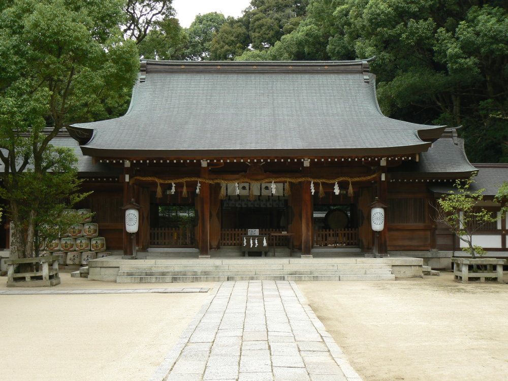 四條畷神社の本殿。